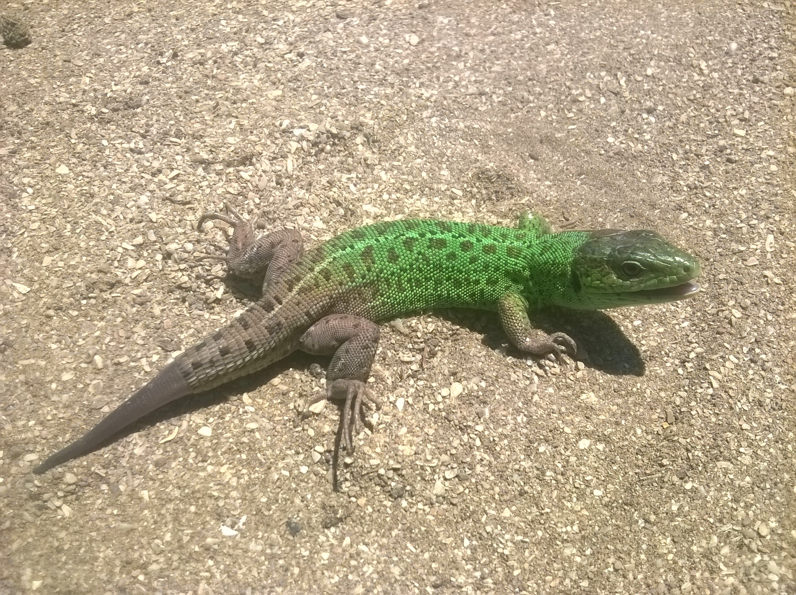 Zolaqlı kərtənkələ